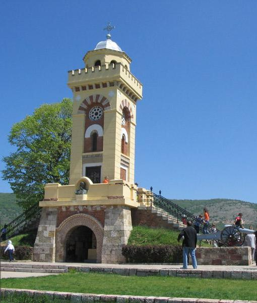 Monument on Čegar, near Niš, Serbia/Monument du mont Čegar, près de Niš, Serbie